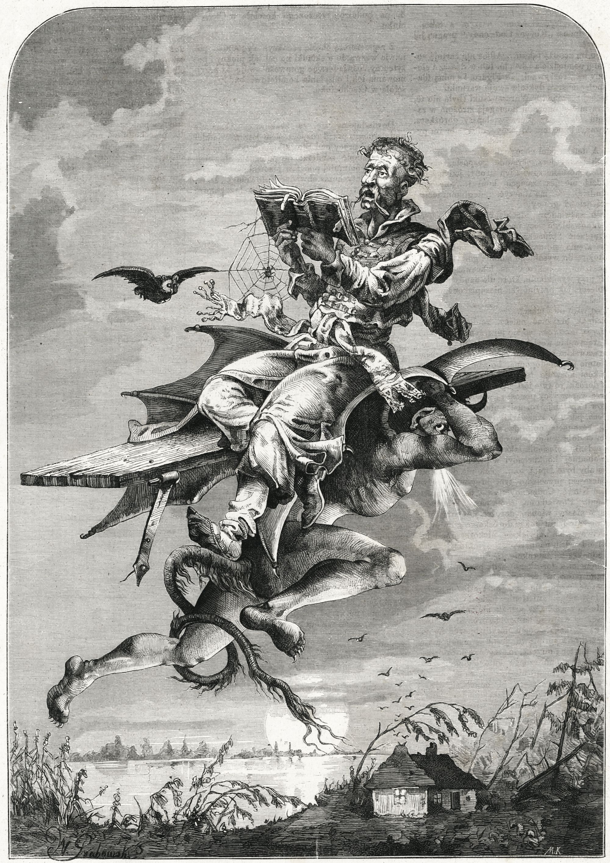 Twardowski śpiewający Godzinki (drzeworyt sztorcowy)